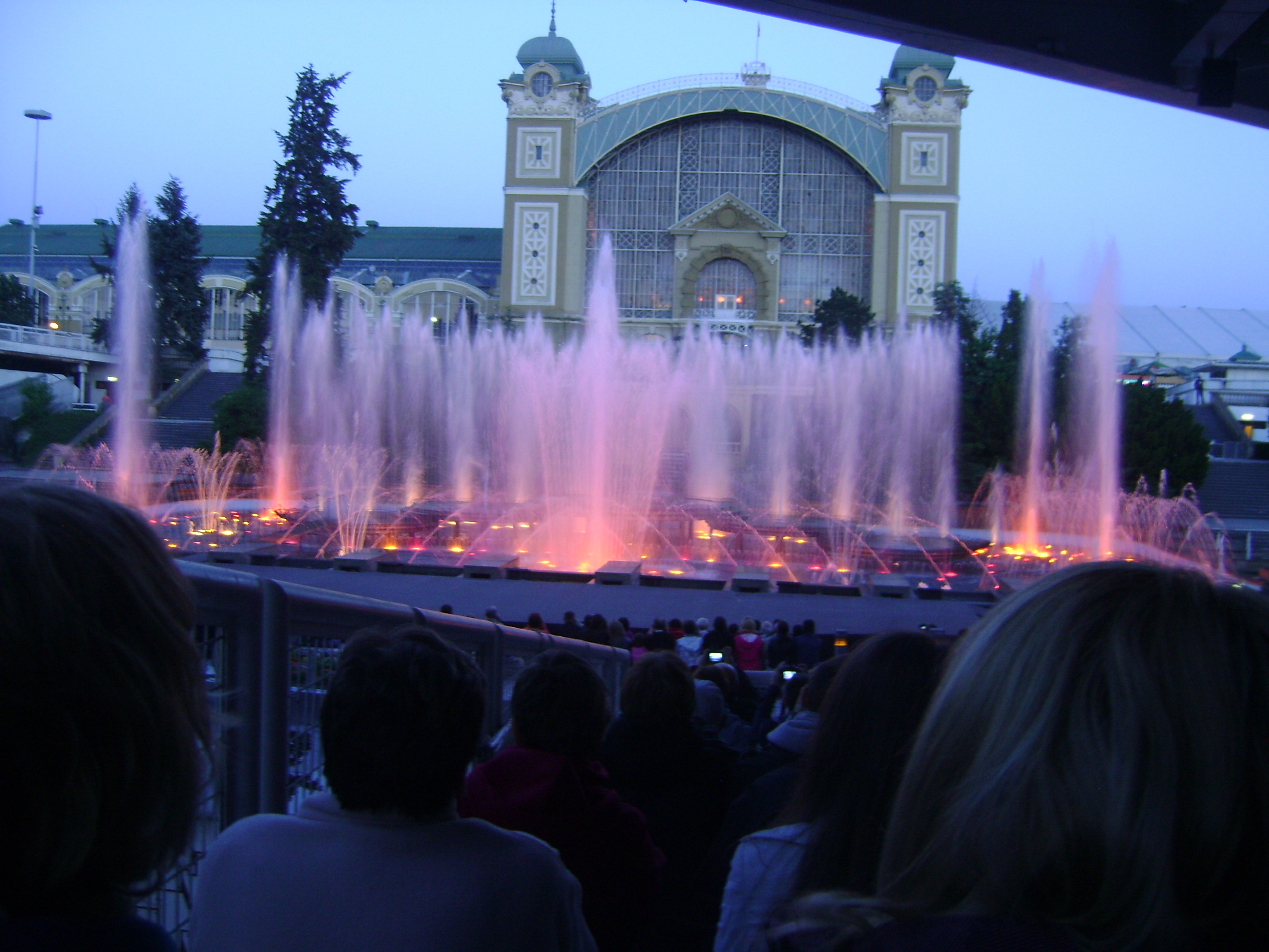 Križikovi vodoskoci, Prag, Češka